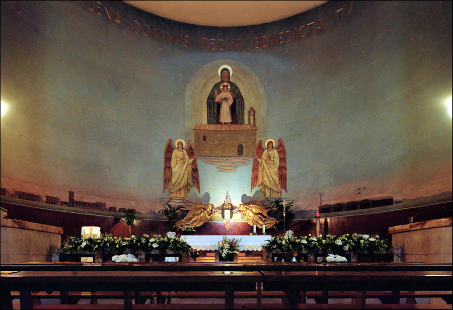 08/05/2009 : Guidonia (RM): chiesa della Madonna di Loreto (Giorgio Calza Bini, 1937)